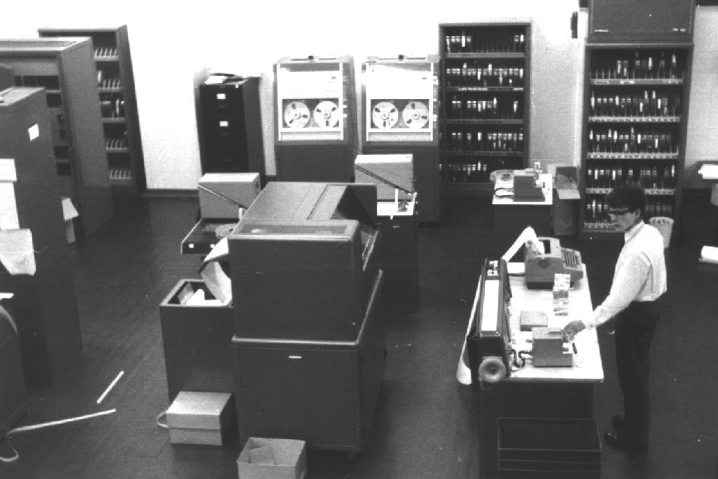 Titan computer